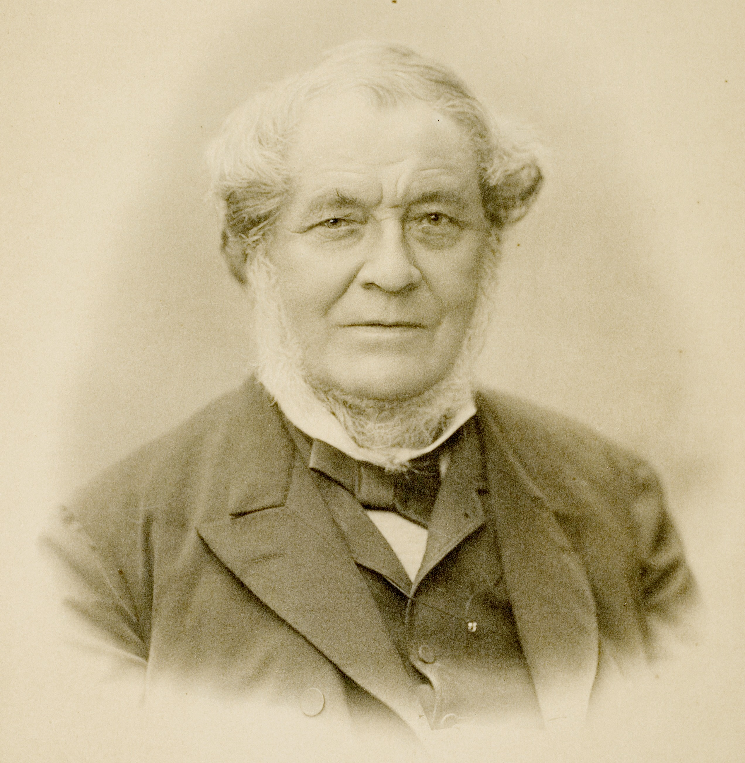 Robert Wilhelm Bunsen, 1852–1889 Professor für Chemie in Heidelberg